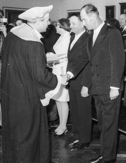 Der Dekan der landwirtschaftlichen Fakultät der Christian-Albrechts-Universität (CAU), Prof. Hugo Steinhauser (links), gratuliert dem Preisträger Dietz Freiherr von Thüngen.